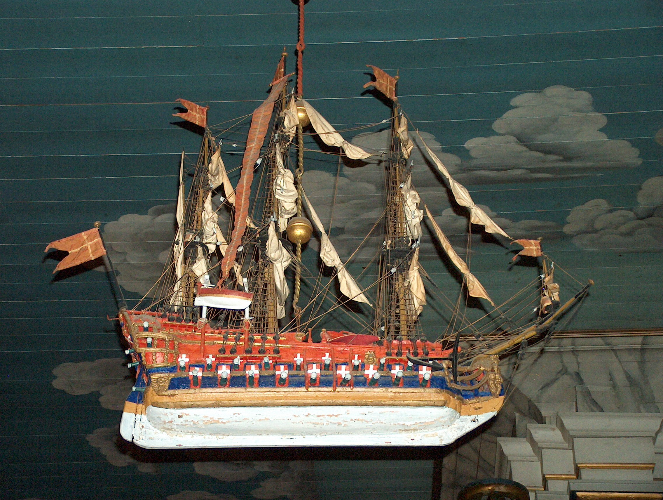 Lunder kirke, Sokna (kirkeskip 1, ca. 1725)